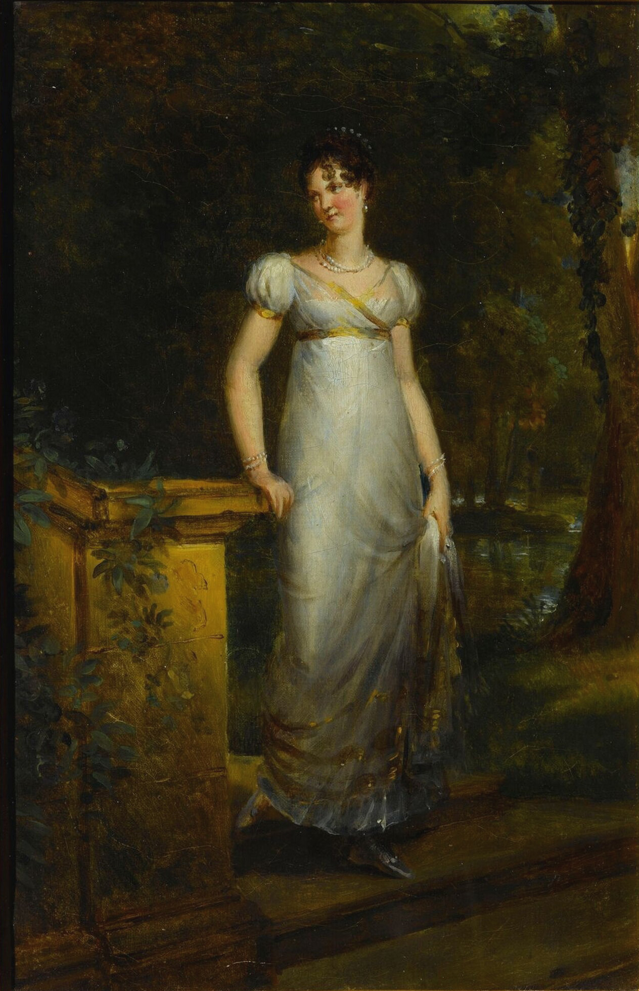 Thérèse-Mathilde-Amélie de Mecklembourg- Strelitz, princesse de Tour et Taxis